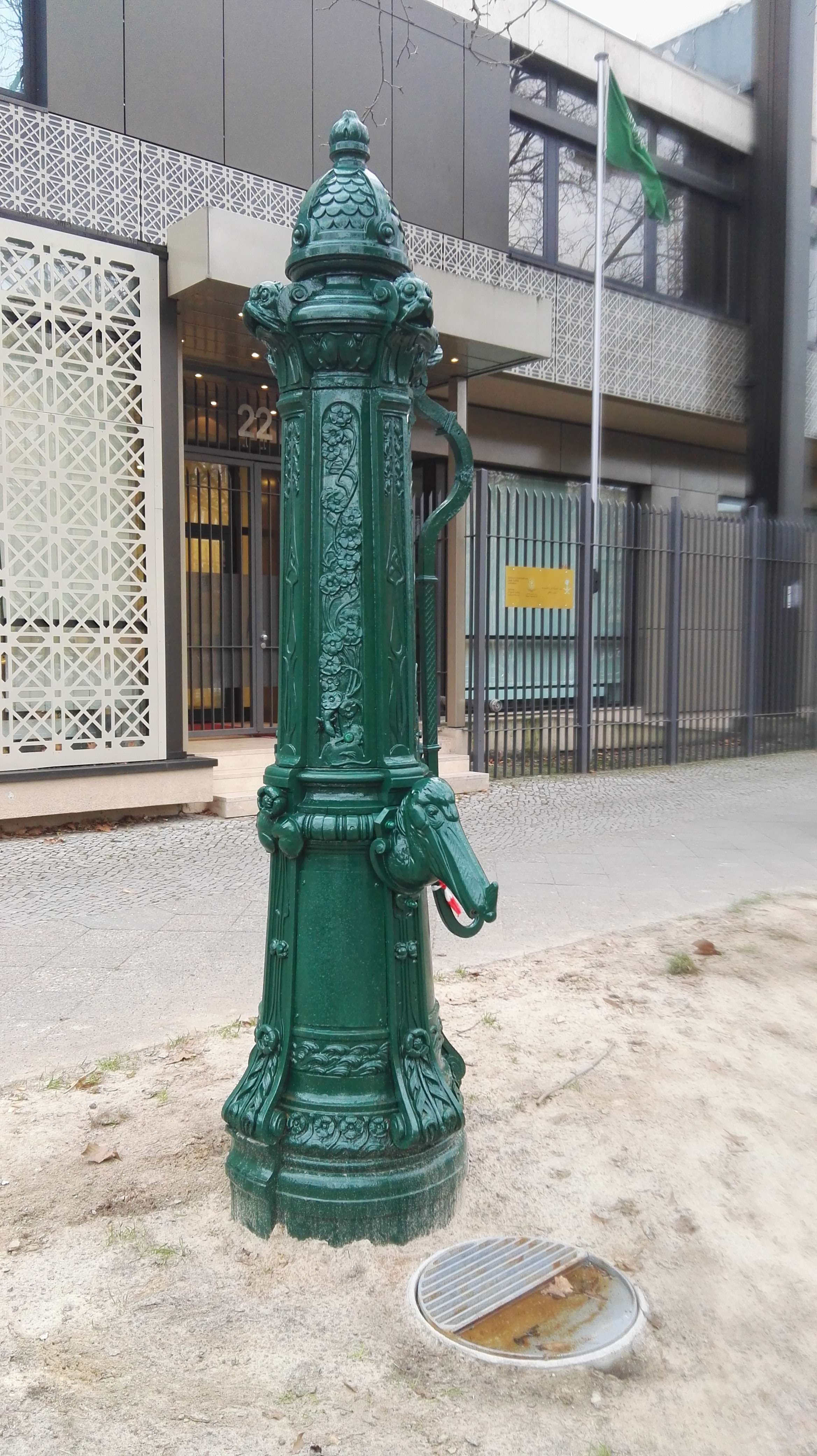 Wasserpumpe in der Bundesallee vor dem Kulturbüro der Botschaft von Saudi-Arabien (Einmündung der Trautenaustraße) in Berlin-Wilmersdorf